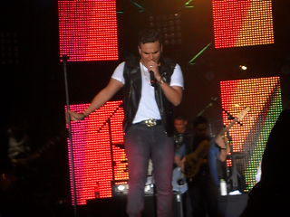 Silvestre Dangond en Bogota